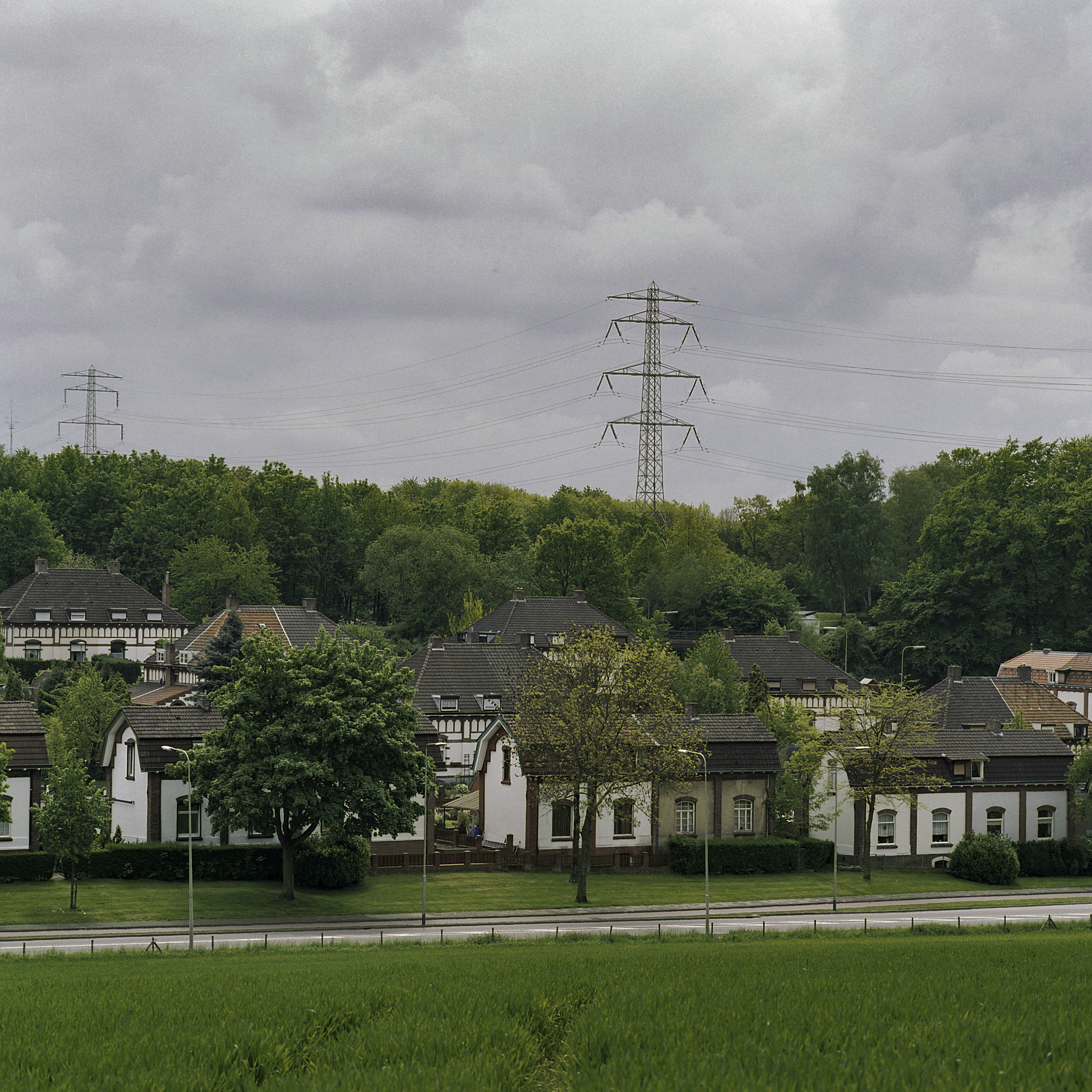 Mijnkolonie De Leenhof: Zicht op mijnkolonie de Leenhof (opmerking: Gefotografeerd voor jaarverslag 2004) This is a possible Rijksmonument: Find the monument in the Monuments database: in Landgraaf All Rijksmonumenten in Landgraaf Is this a Rijksmonument? Yes No More information about this project and help. More images to work at in Category:Possible Rijksmonumenten.